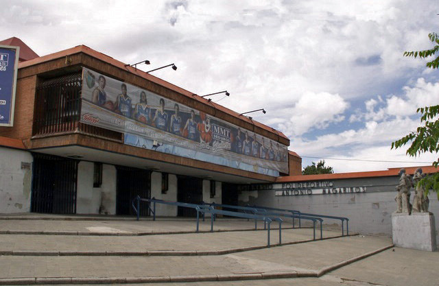 Polideportivo Antonio Magariños. Calle Serrano, 127. Construido entre 1961 y 1965.